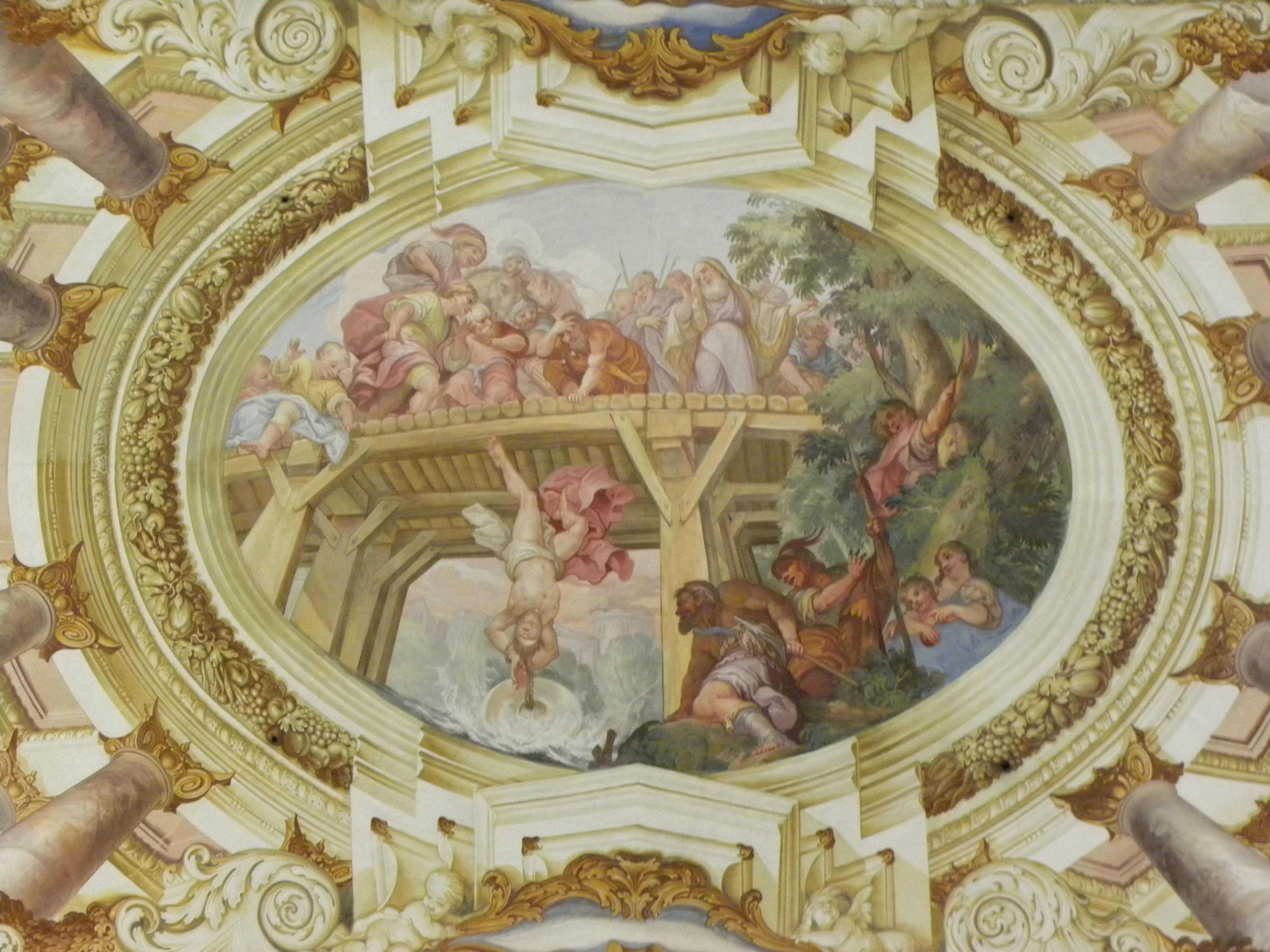 Der Tod des Heiligen Florian, Deckenfresko der Stiftsbasilika St. Florian 2010; eigene Aufnahme des Autors